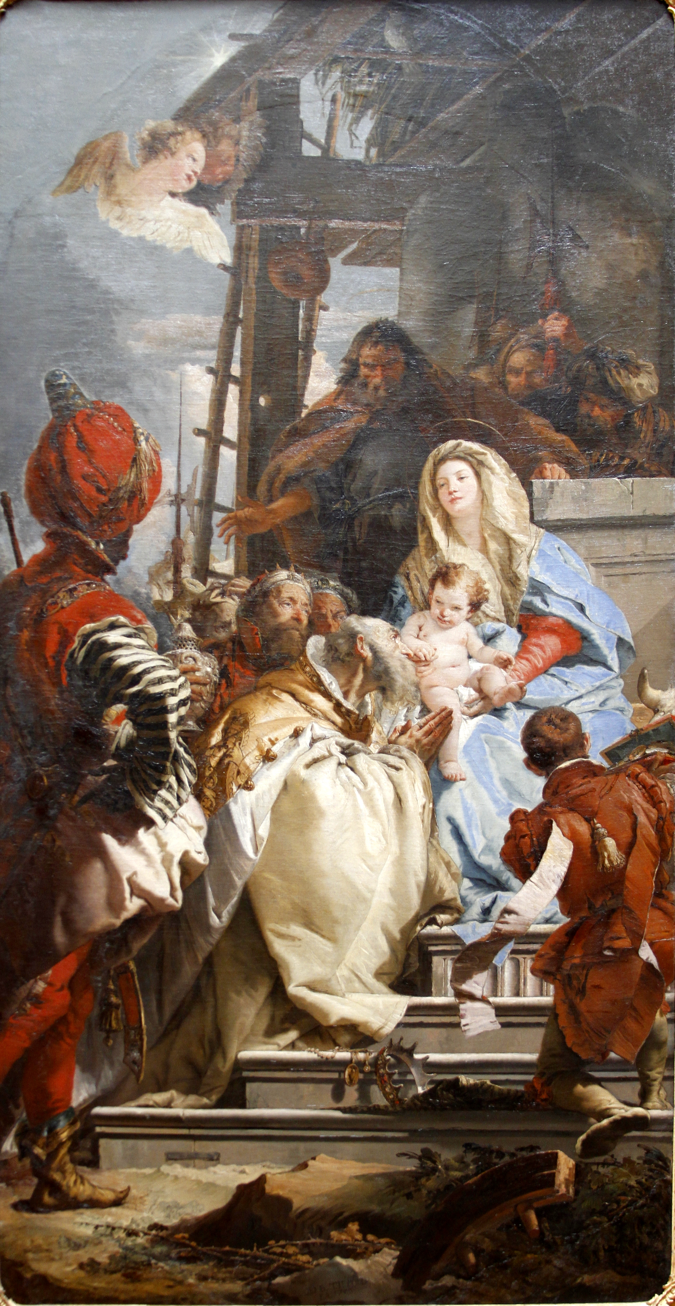 Alte Pinakothek - Munich - Germany